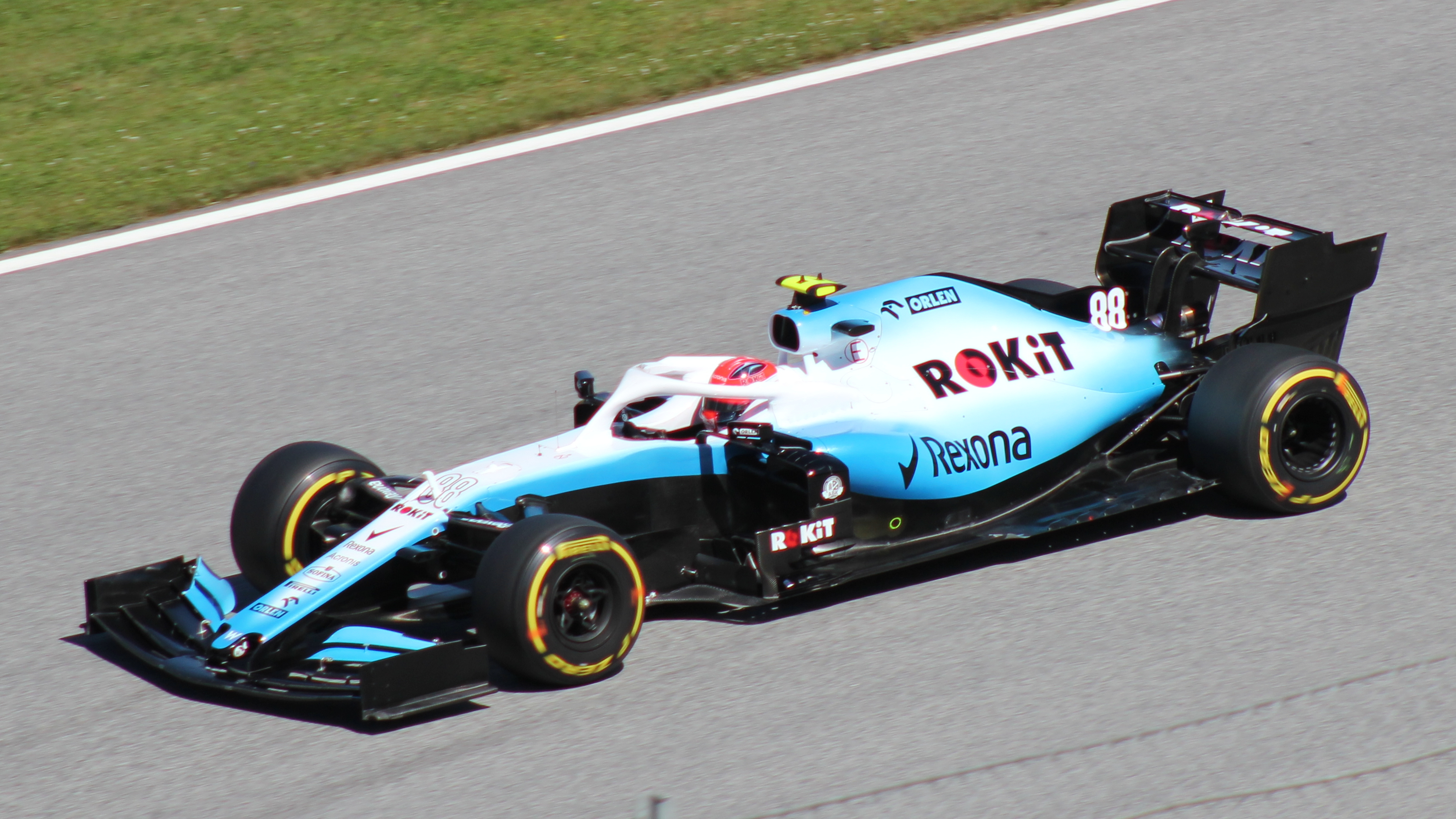 Kubica beim Rennwochenende in Österreich 2019